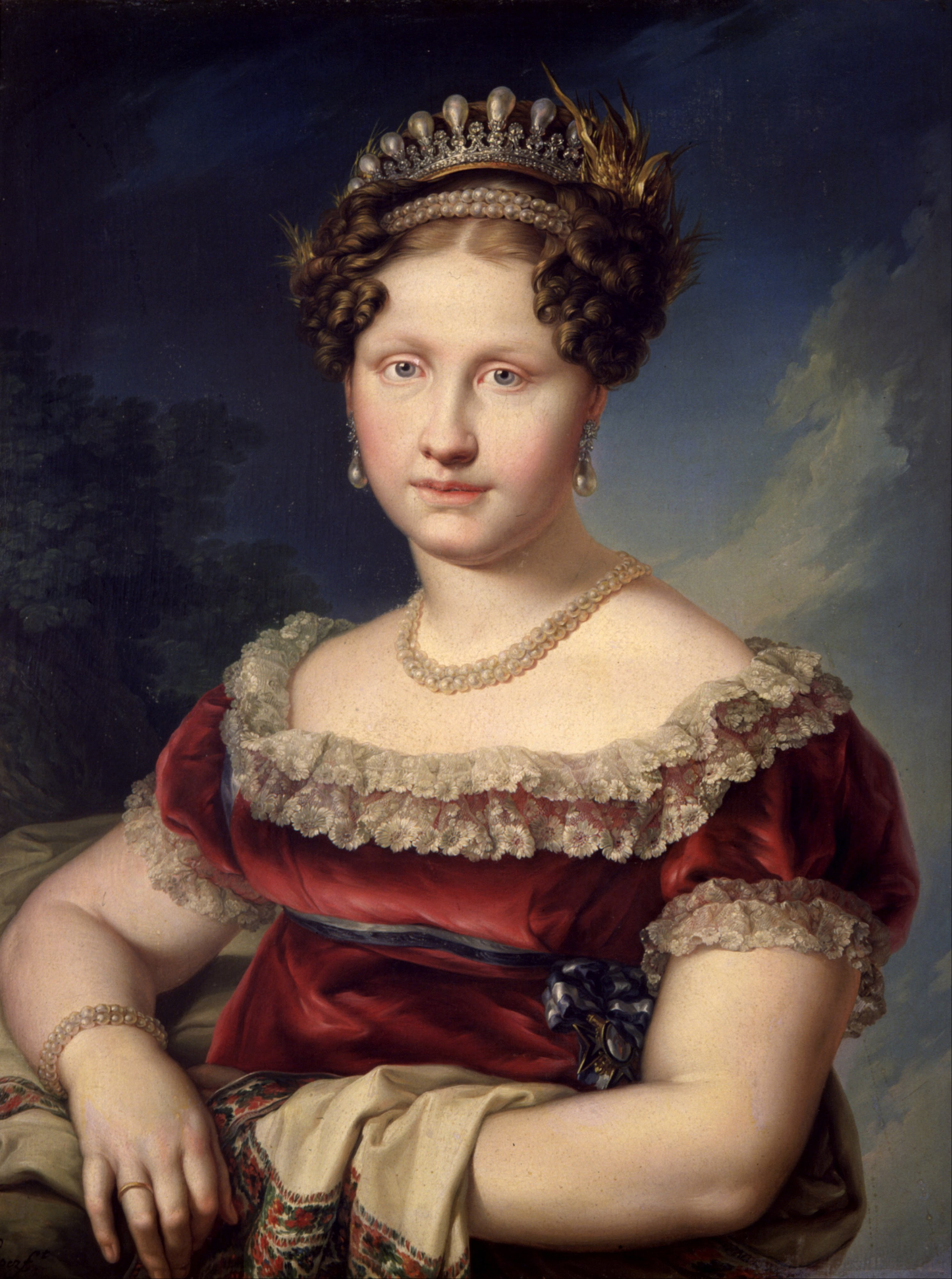 Retrato de la infanta Luisa Carlota de Borbón (1804-1844), que era hija del rey Francisco I de las Dos Sicilias y de la reina María Isabel de Borbón y se convirtió en infanta de España por su matrimonio con el infante Francisco de Paula de Borbón, que era el menor de los hijos del rey Carlos IV de España.